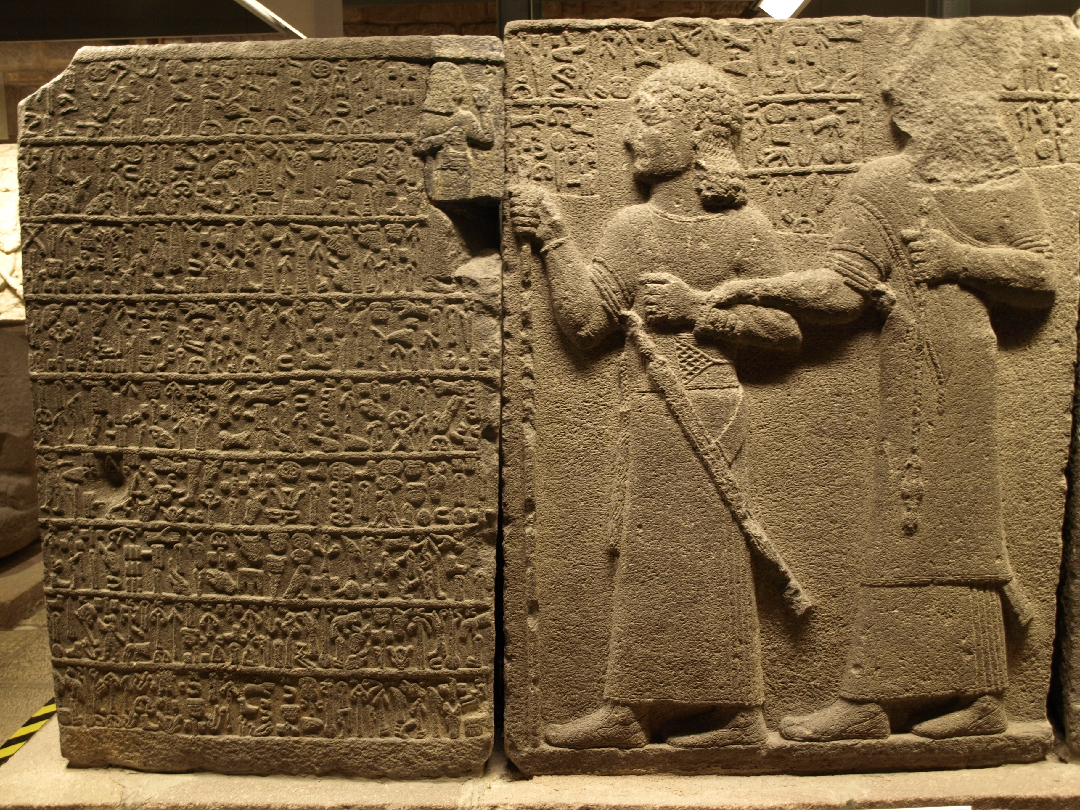 Relief von Yariri und Kamani (Karkemiš) mit Hieroglyphenrelief